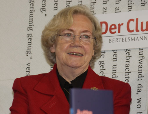 Dieses Fotos dürfen Sie honorarfrei nutzen, wenn Sie folgenden credit beachten: Copyright: Das blaue Sofa / Club Bertelsmann. Jutta Limbach war Präsidentin des Bundesverfassungsgerichts in Karlsruhe, sie lehrte in Berlin als Professorin für Bürgerliches Recht, Handels- und Wirtschaftsrecht und war dort von 1989 bis 1994 Justizsenatorin und sie war bis 2008 Präsidentin des Goethe Instituts.